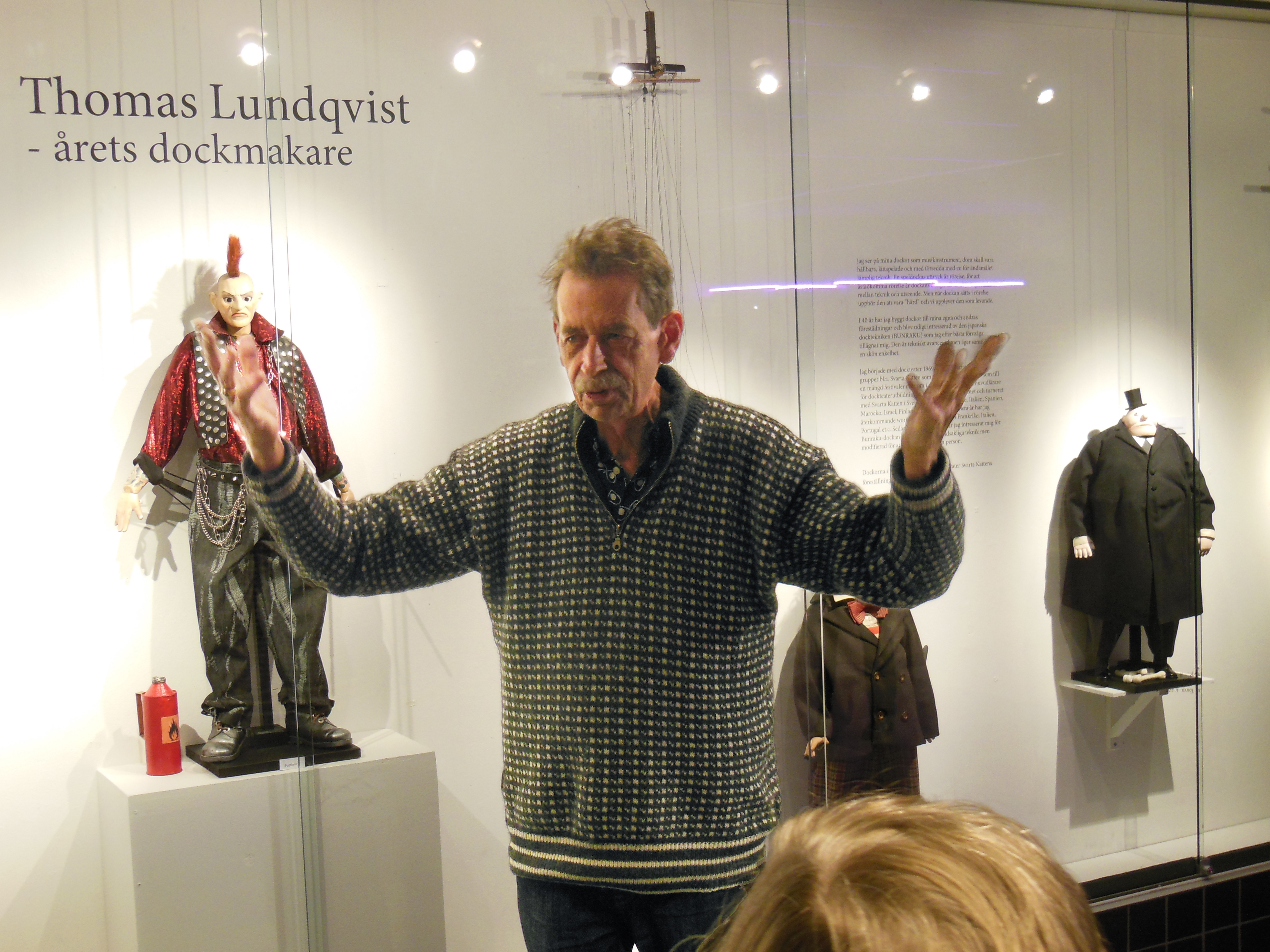 Dockmakaren Thomas Lundqvist på Frölunda Kulturhus i november 2015.